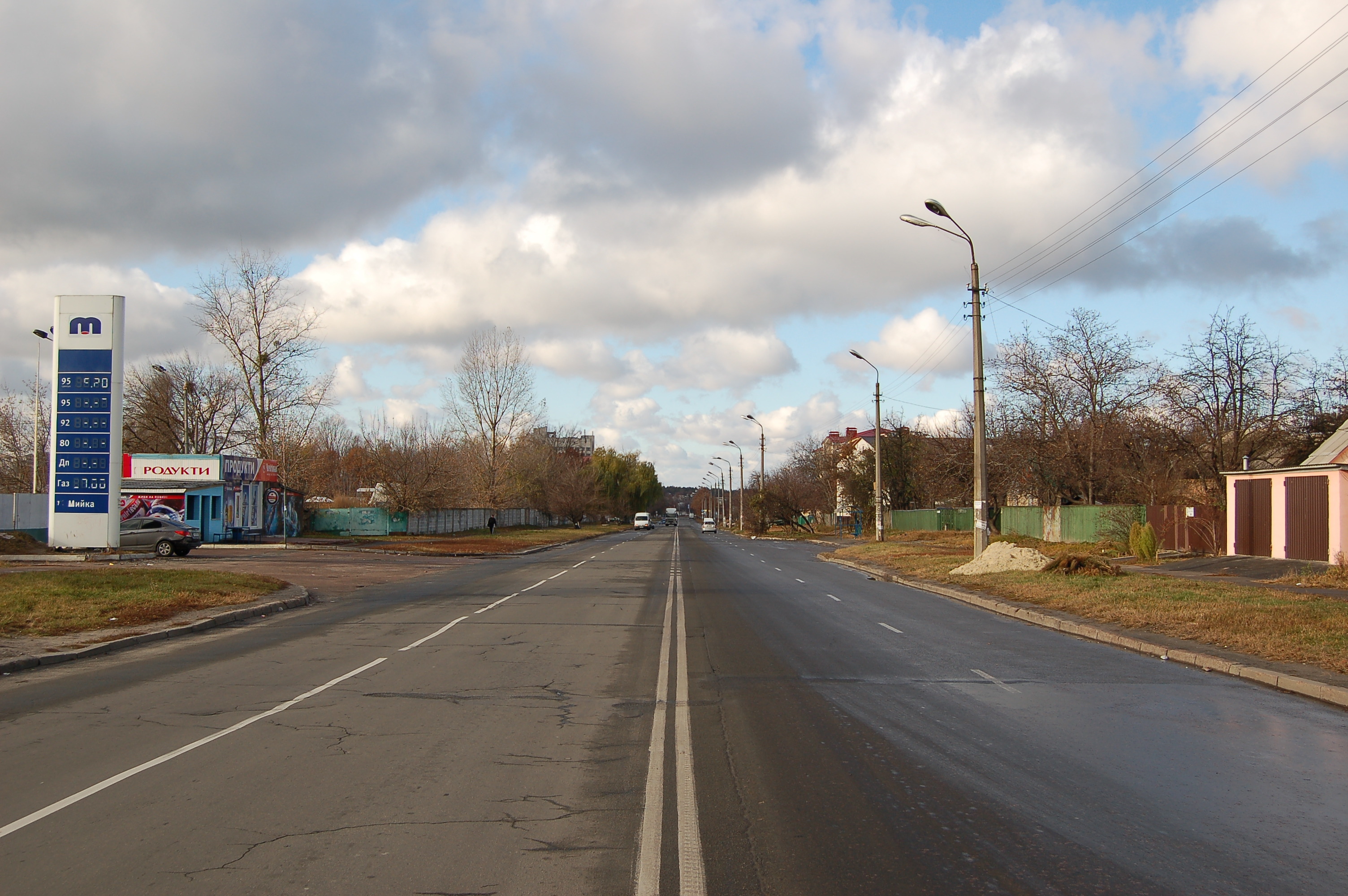 Улица Генерала Наумова в Киеве